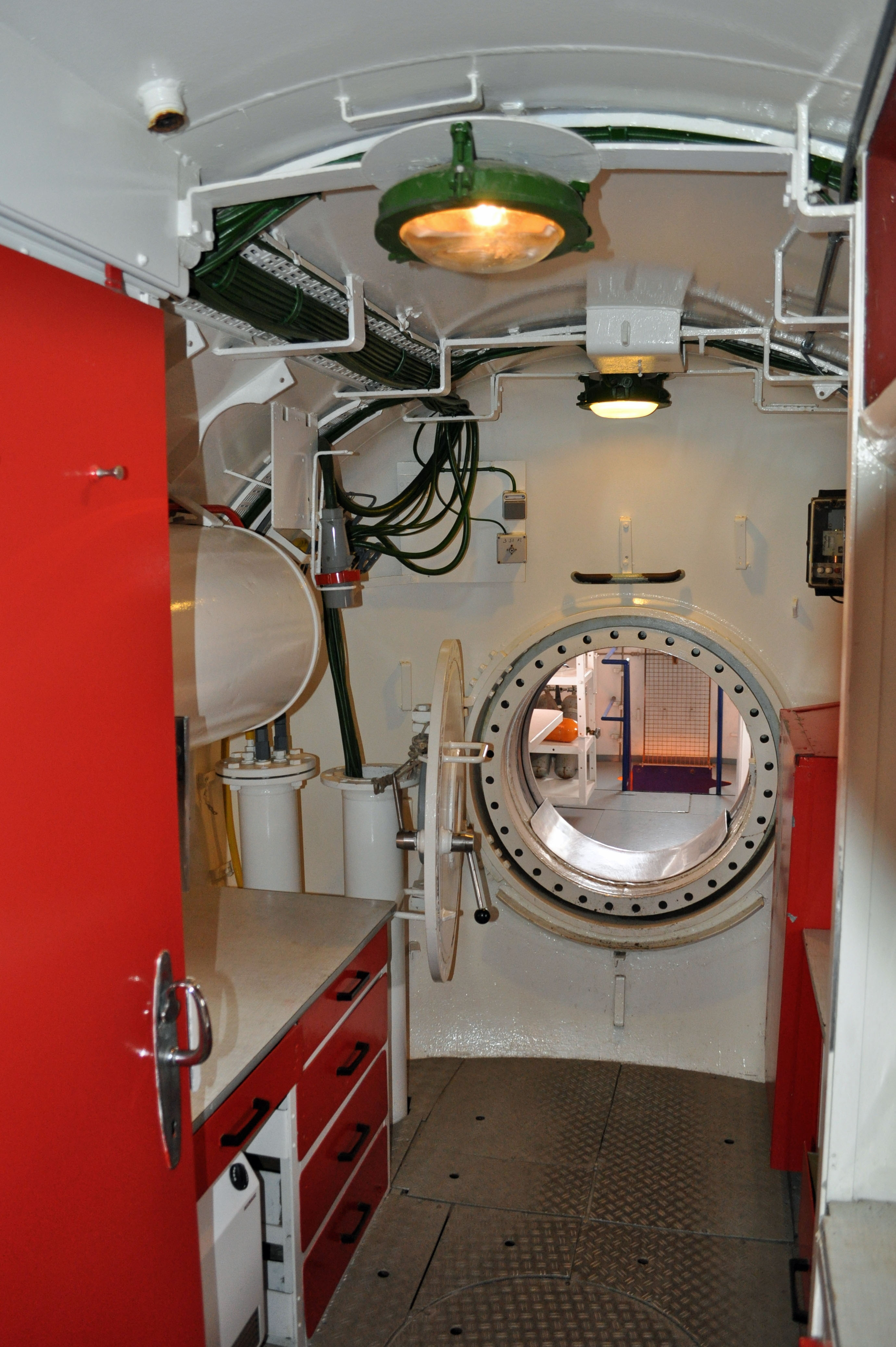 Exponat bzw. Gebäude im Nautineum Stralsund auf dem Dänholm, Stralsund.